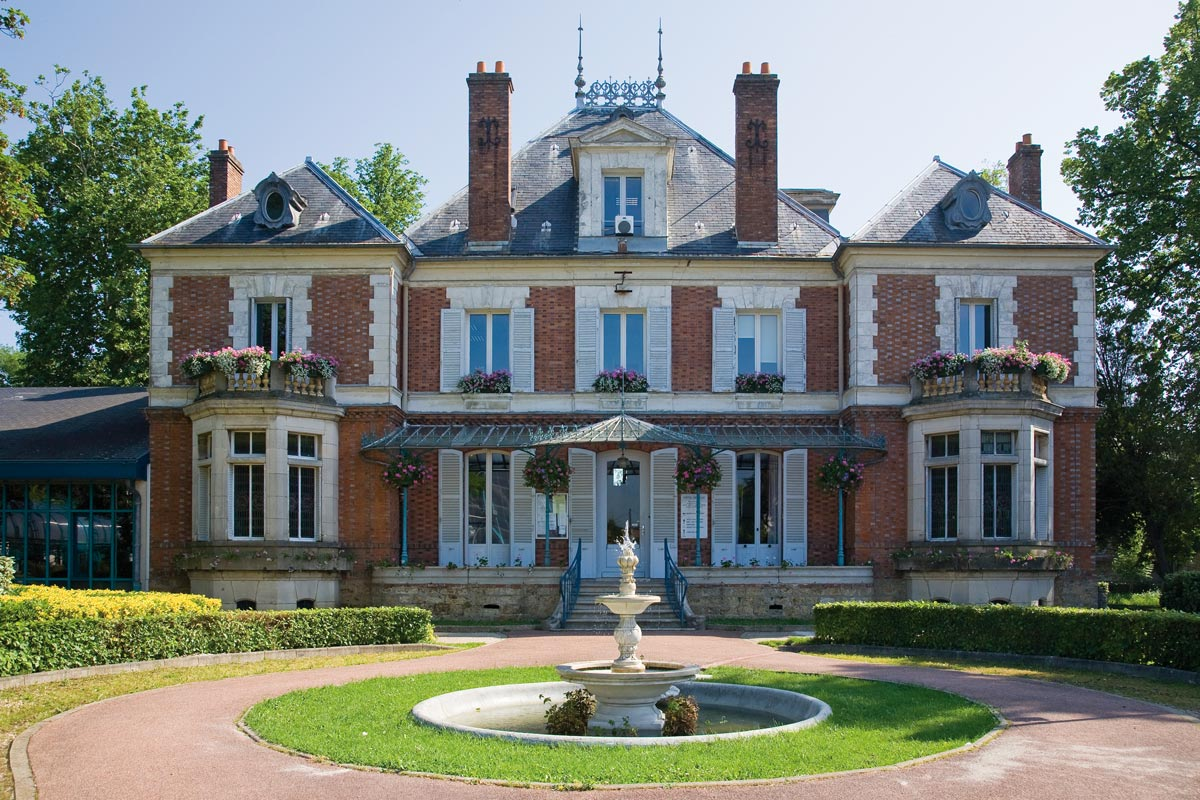 Mairie de Quincy